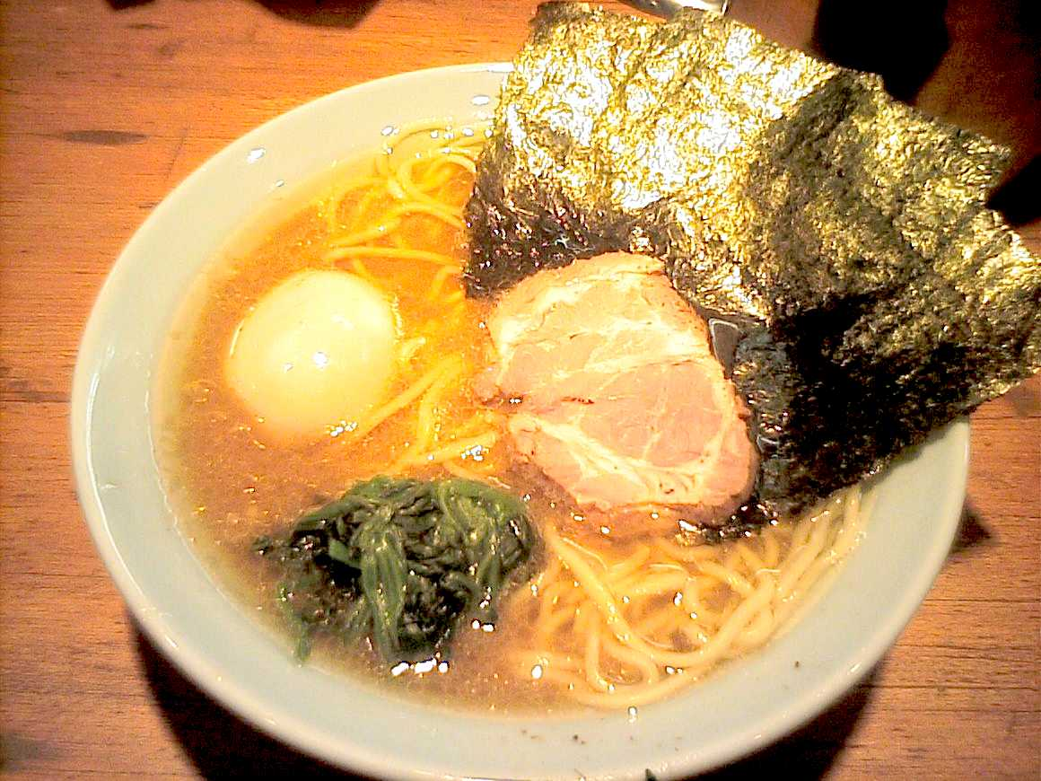 家系ラーメンの例（2006年6月7日投稿者が撮影）